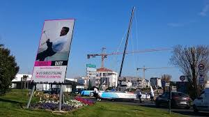 image du rond point charcor aux sables d'olonne avec le portrait du sportif Emeric DARY